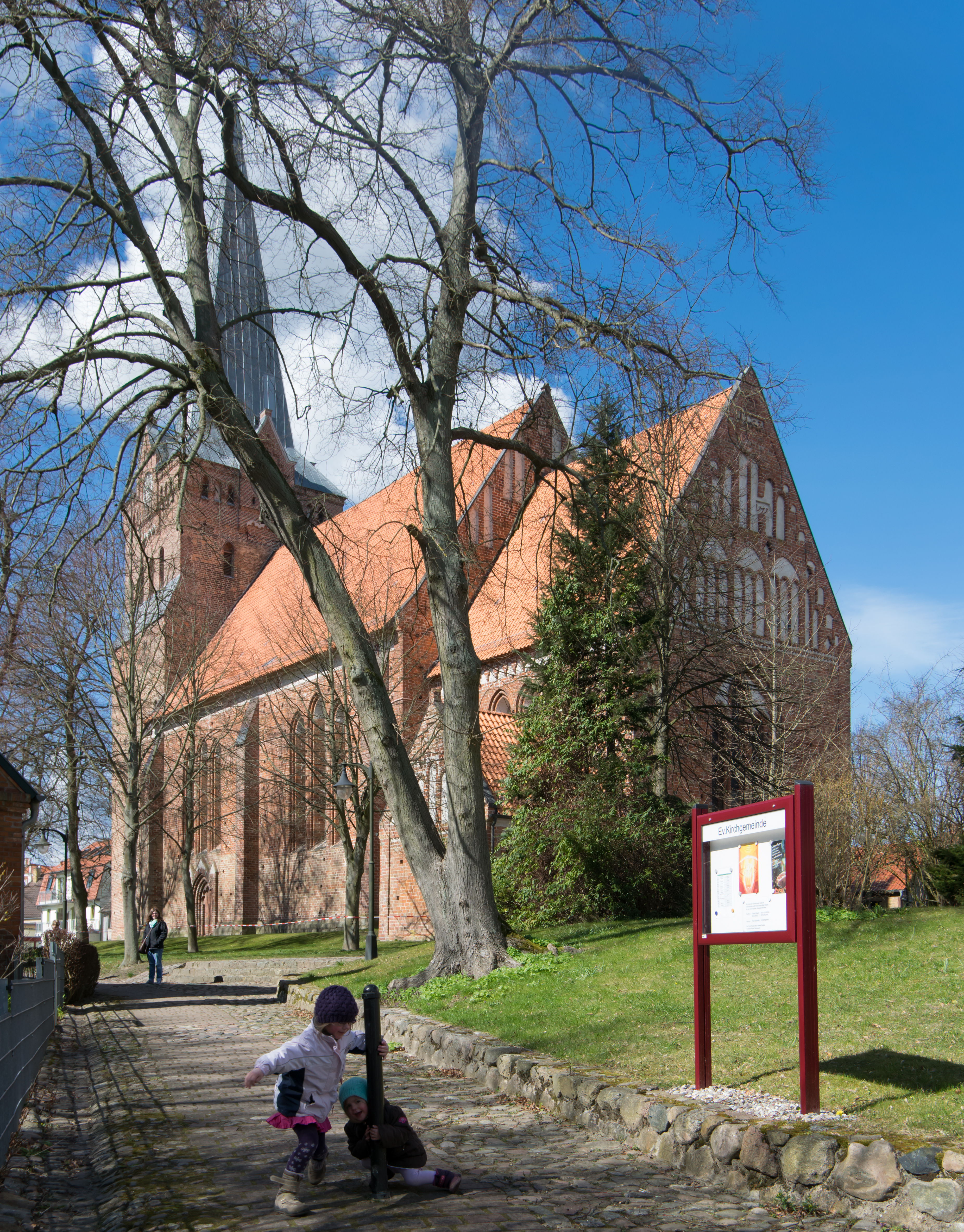 Bad Sülze Kirche von Südosten